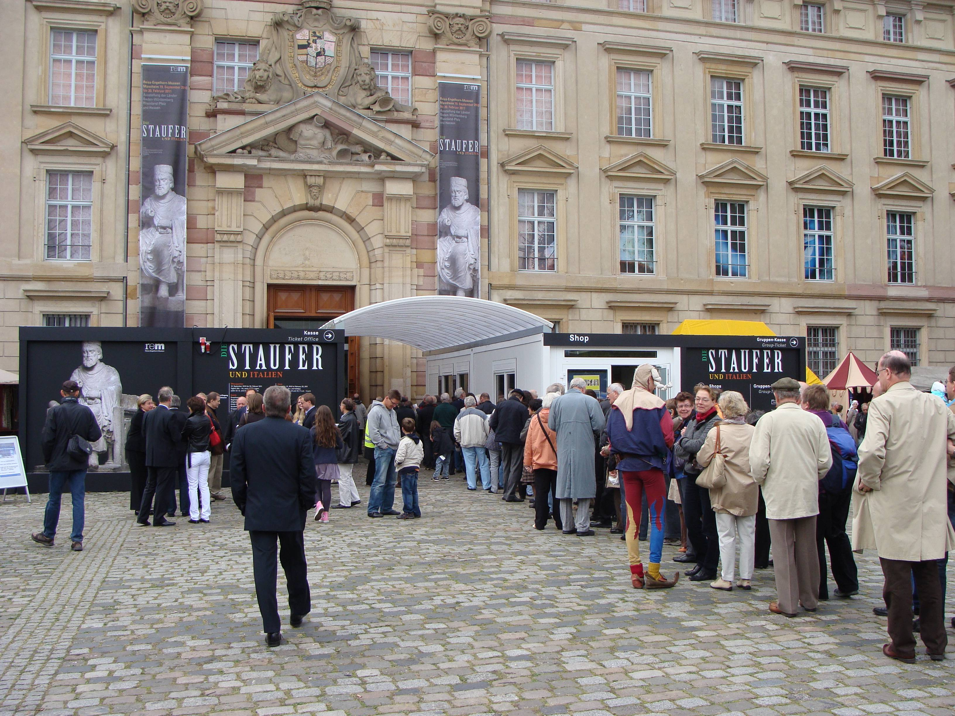 Besucher am Eingang zur Mannheimer Staufer-Ausstellung